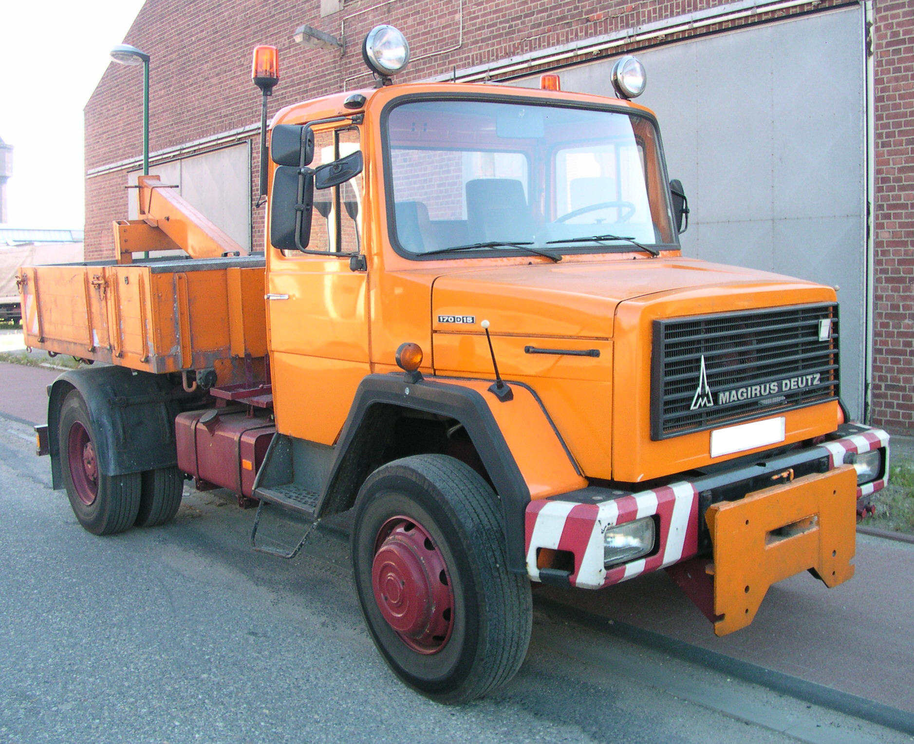 Willich, Borgward-Treffen im LKW-Museum, Magirus, zweiachsiger Eckhauber mit Pritsche und Kran